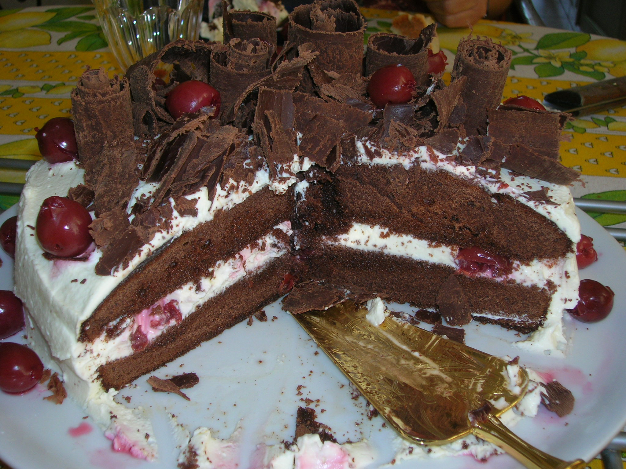 Gâteau forêt noire